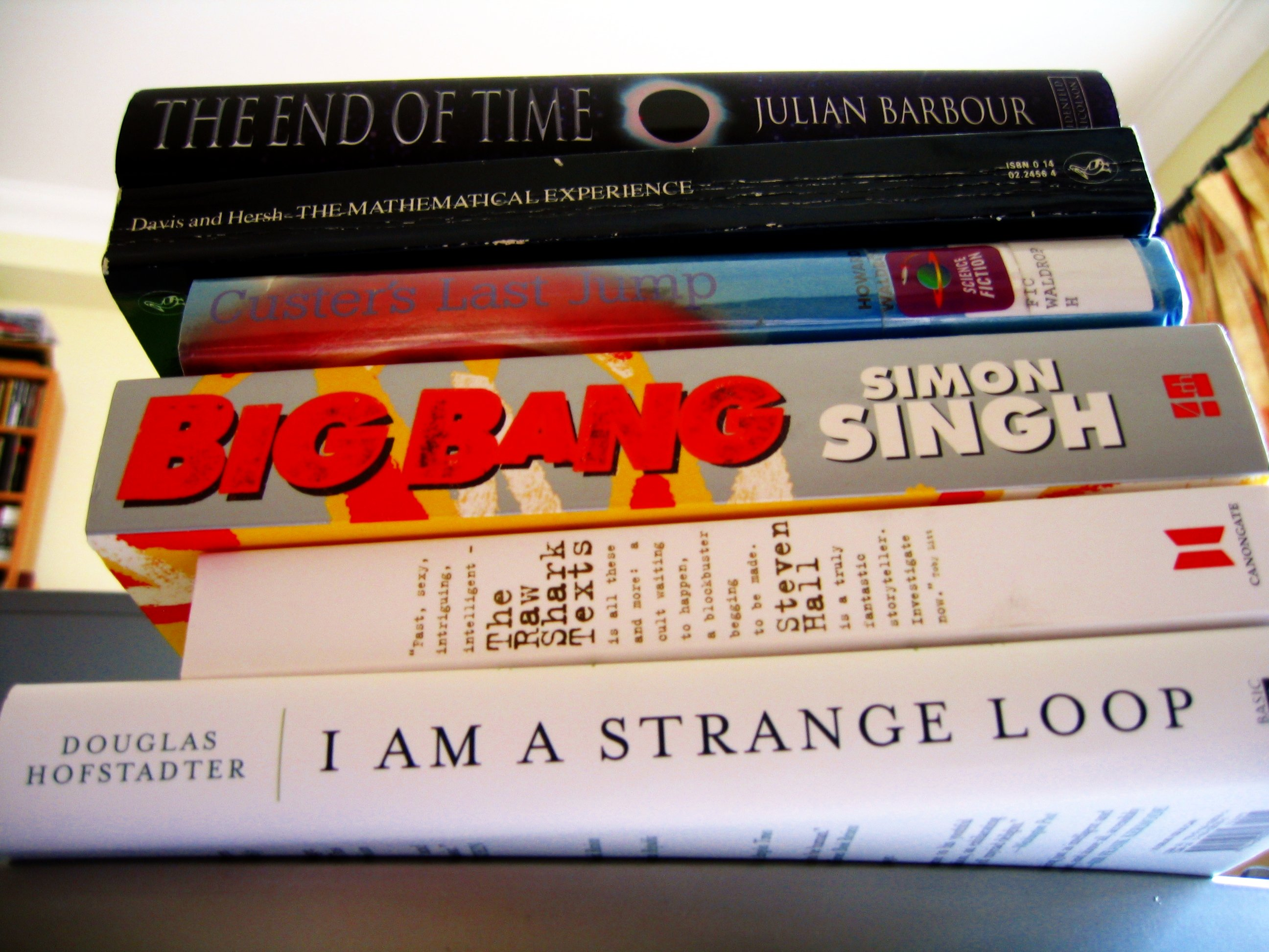 Book Big Bang by Simon Singh